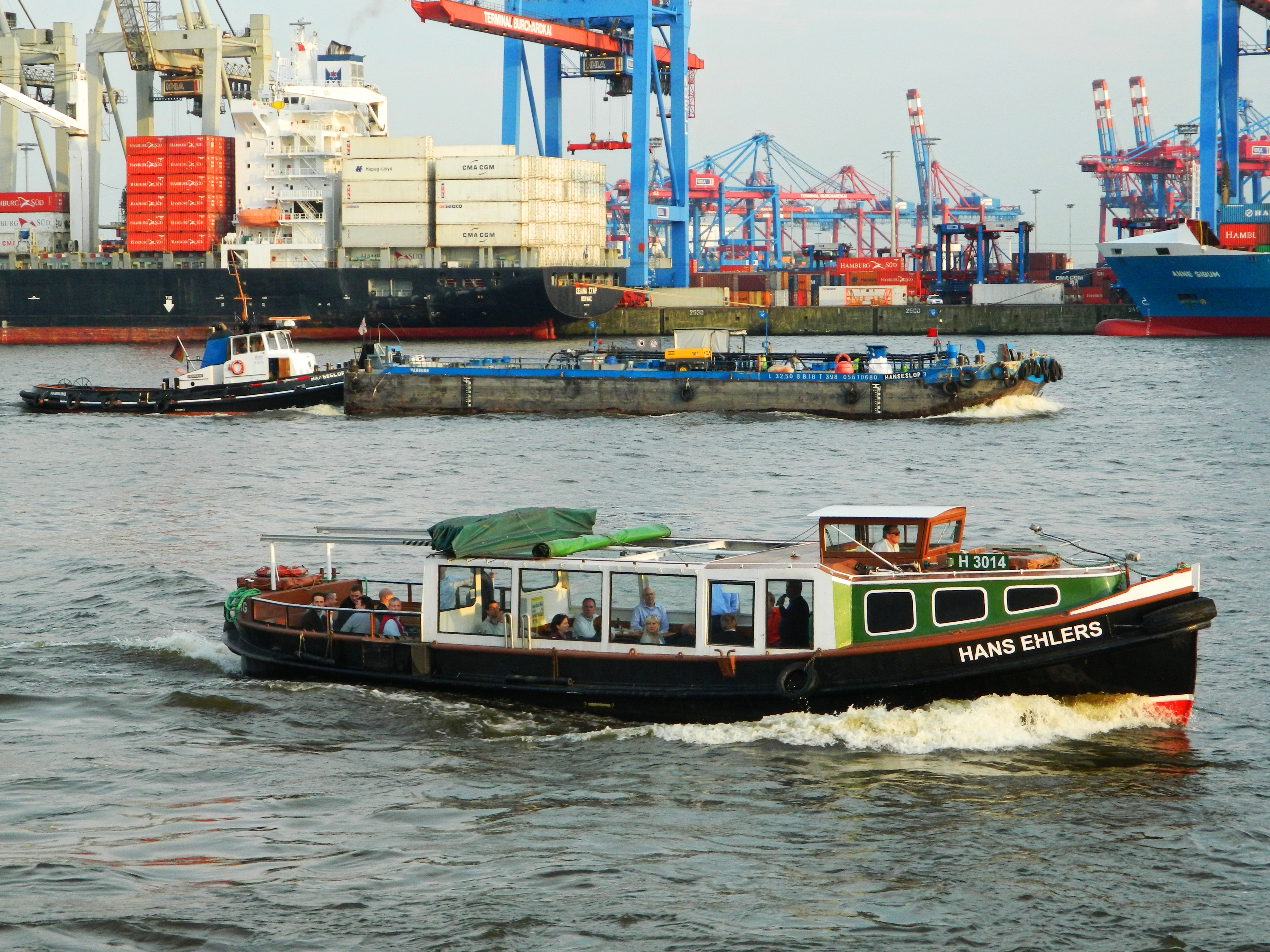 Hans Ehlers (H3014)